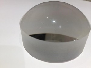 Olvasókö-plán-konvexis-lencse